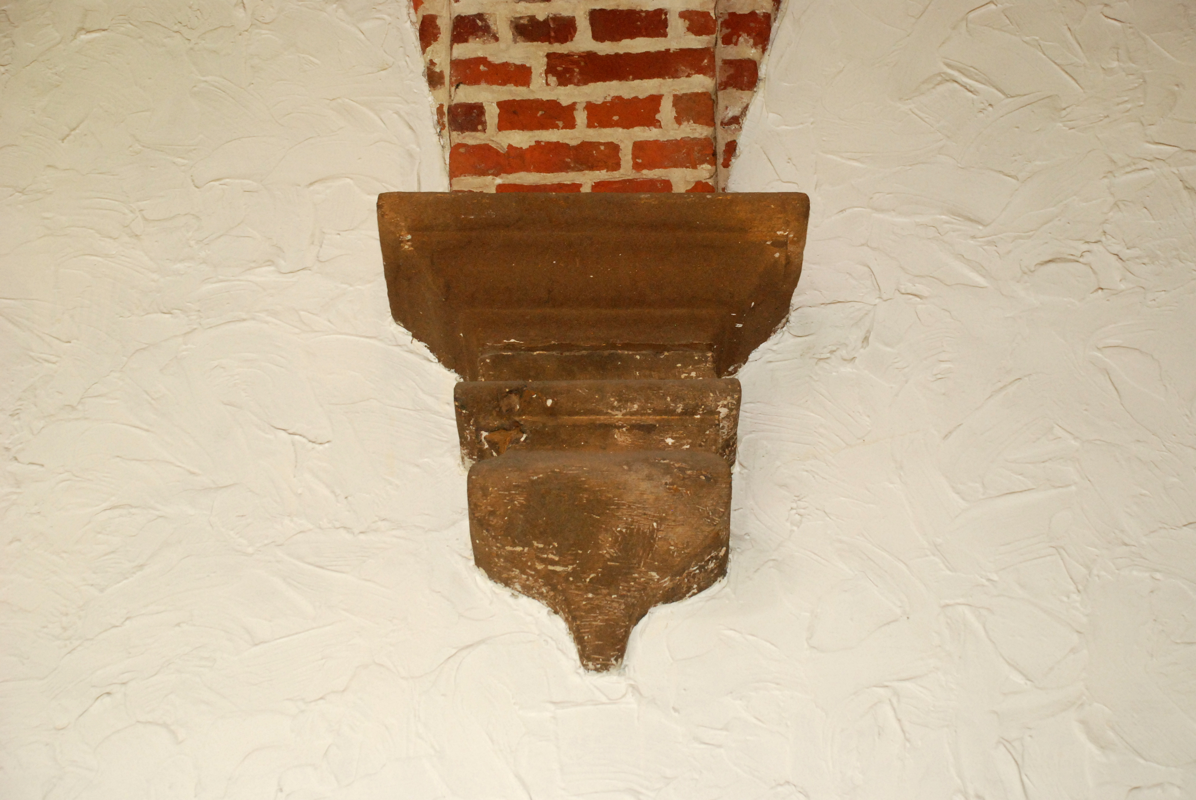 Belgique - Brabant wallon - Ancien couvent des Carmes Chaussés de Wavre